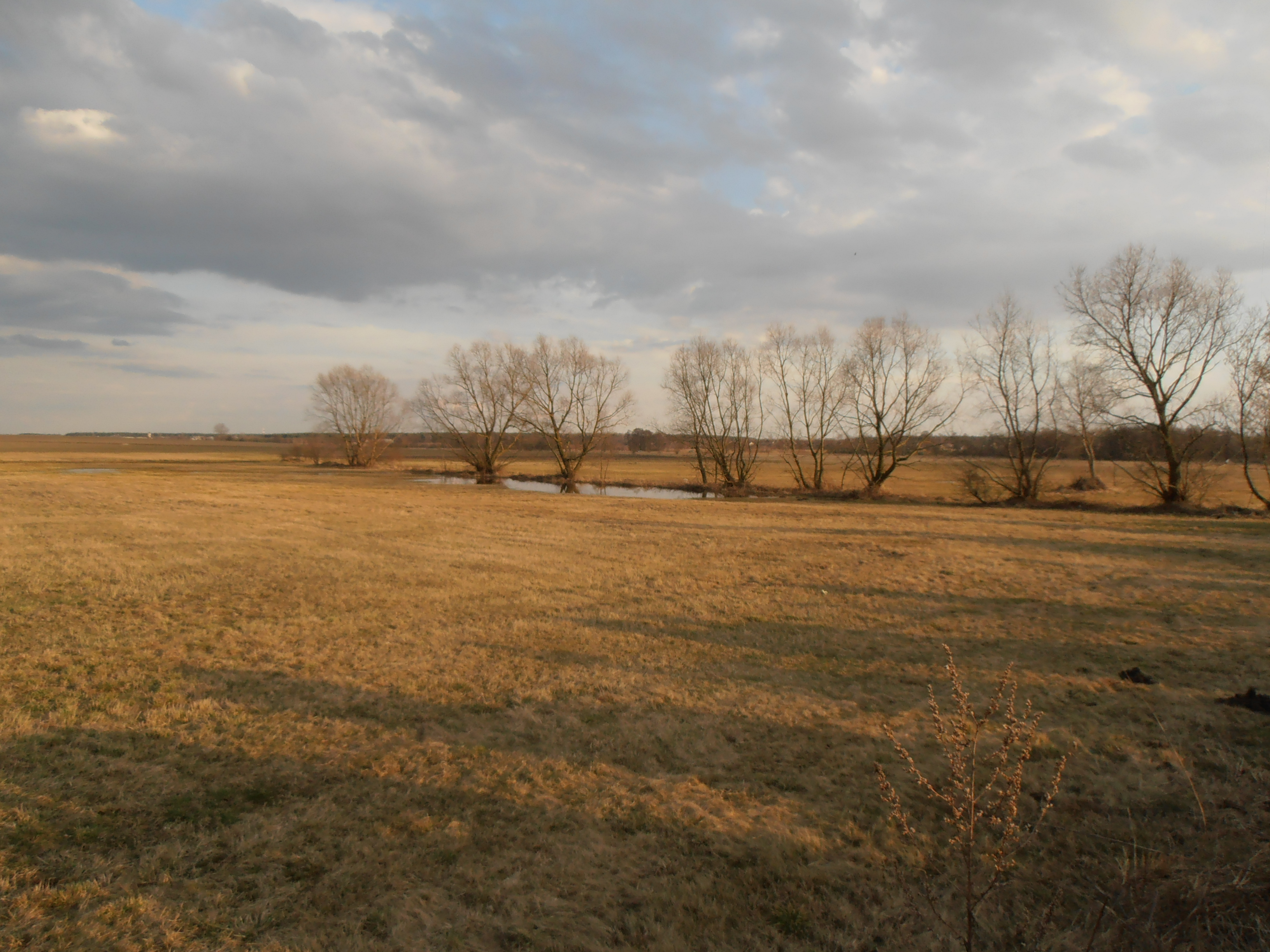 Okolice Radoryża Kościelnego w gm. Krzywda, pow. łukowskim, woj. lubelskim, w Polsce.